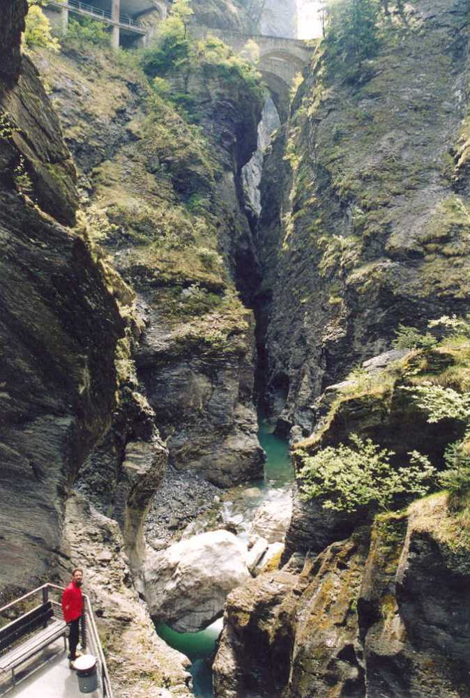 Die Schlucht der Viamala an ihrer engsten Stelle